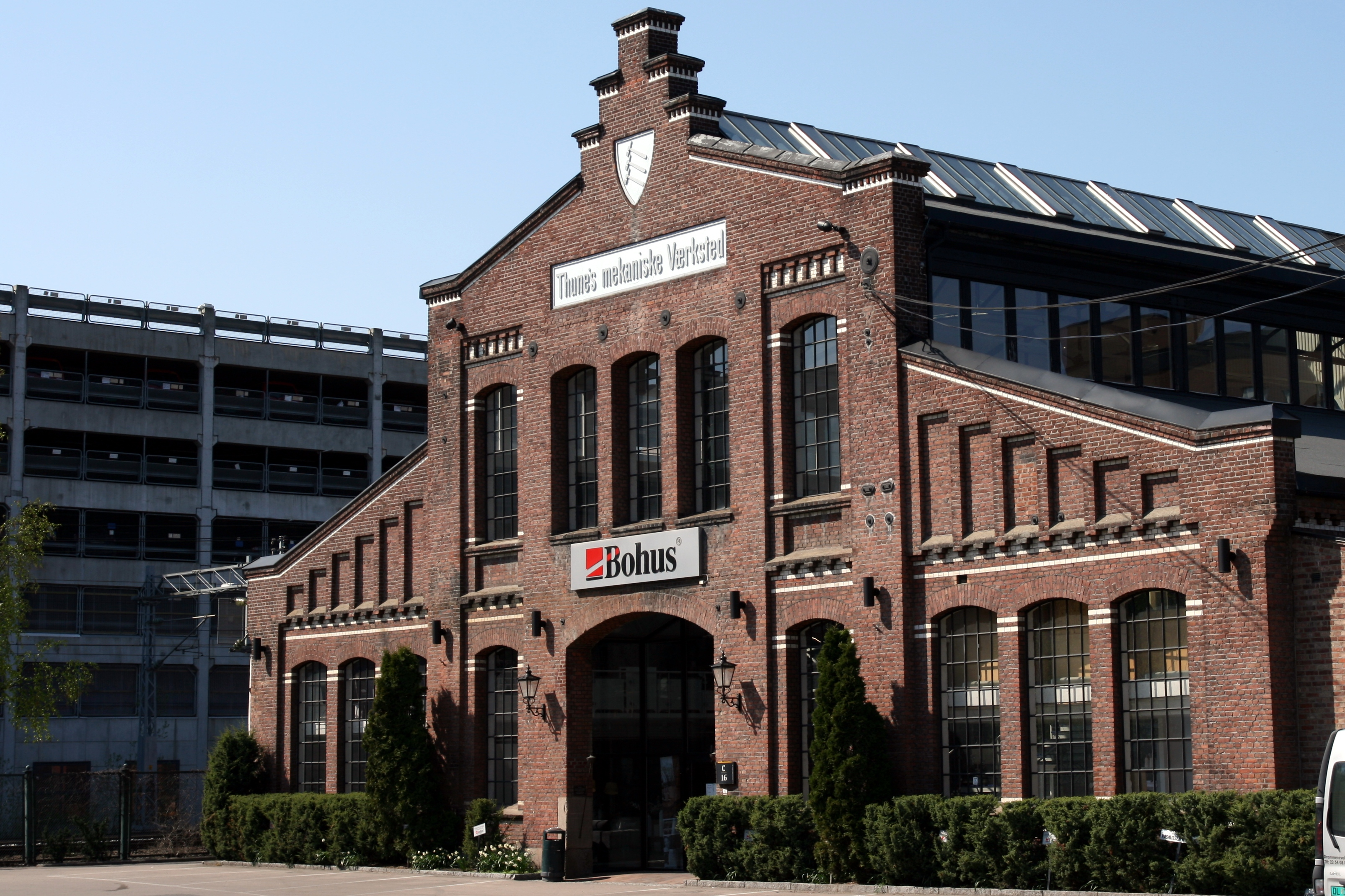 Kjelesmia på Thunes mekaniske verksted på Skøyen i Oslo. I dag brukes lokalene til butikklokaler og kontorer.